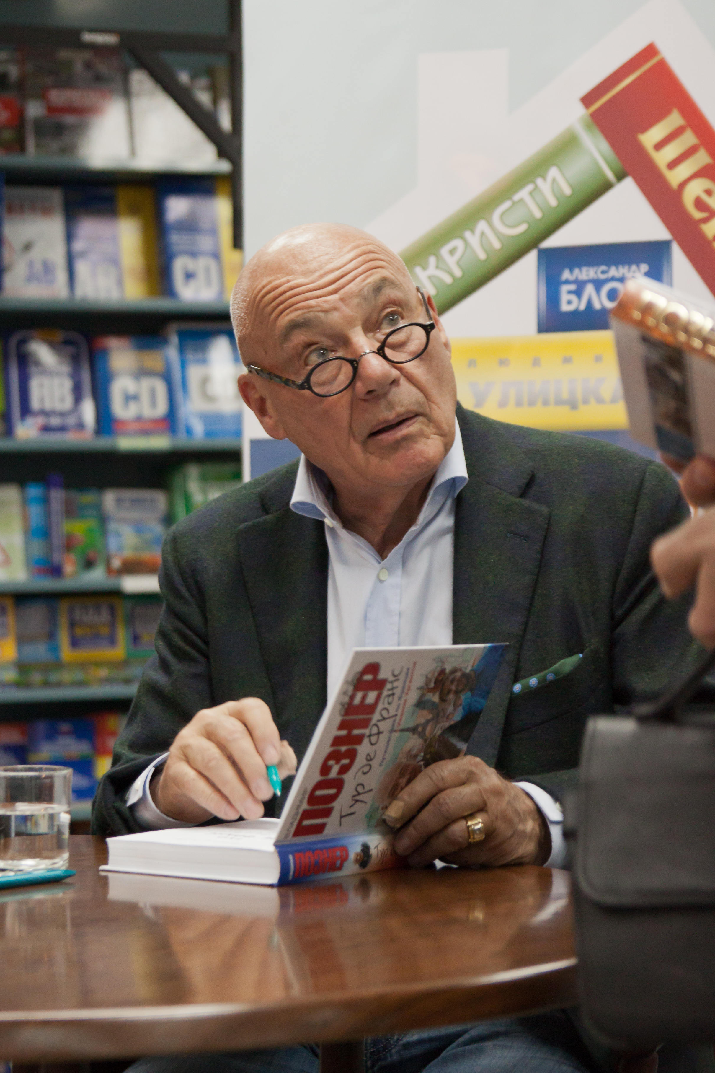 Владимир Познер на презентации книги "Их Италия" ("Дом книги" на Новом Арбате)